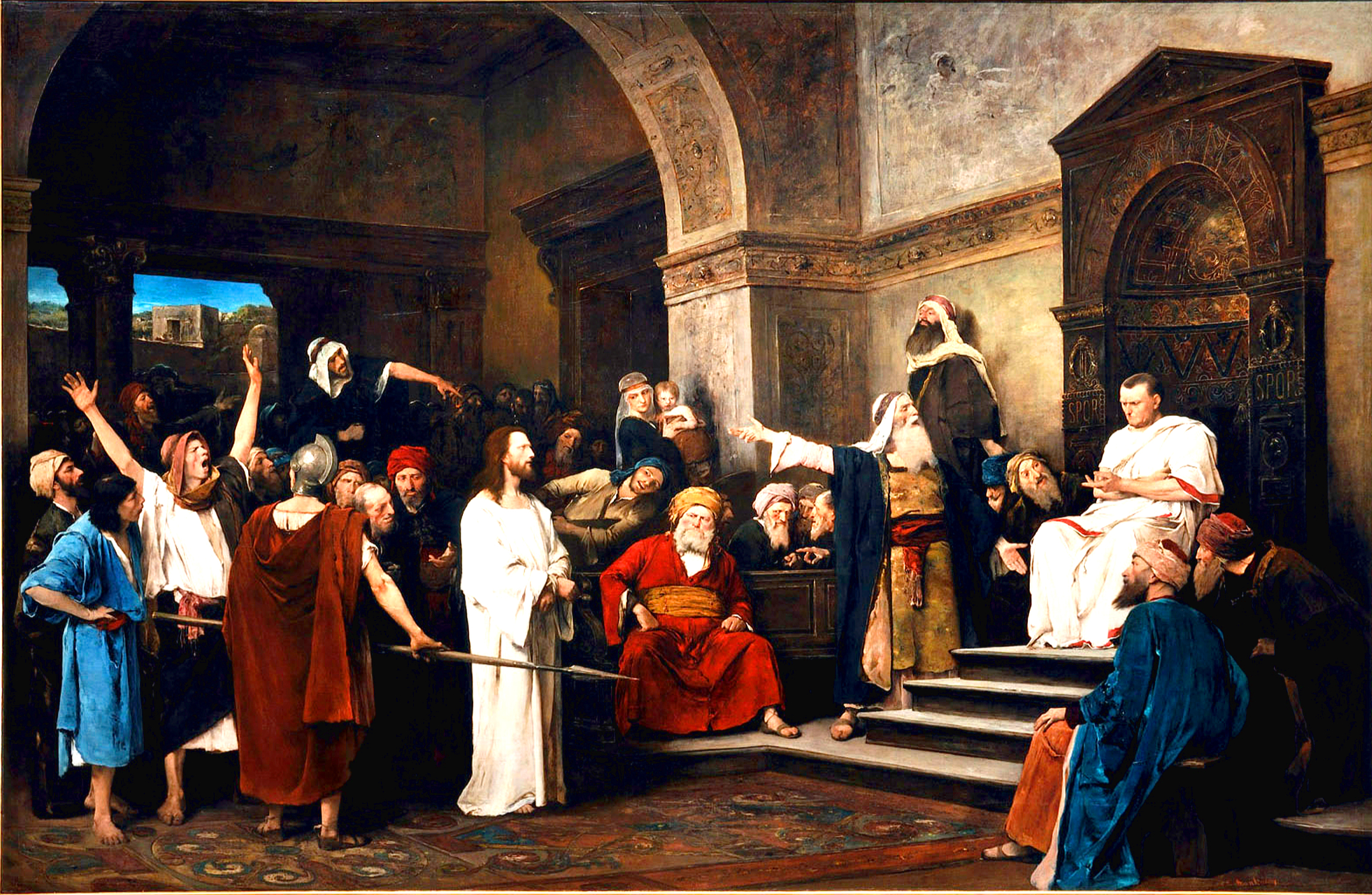 Munkácsy Mihály: Krisztus Pilátus előtt